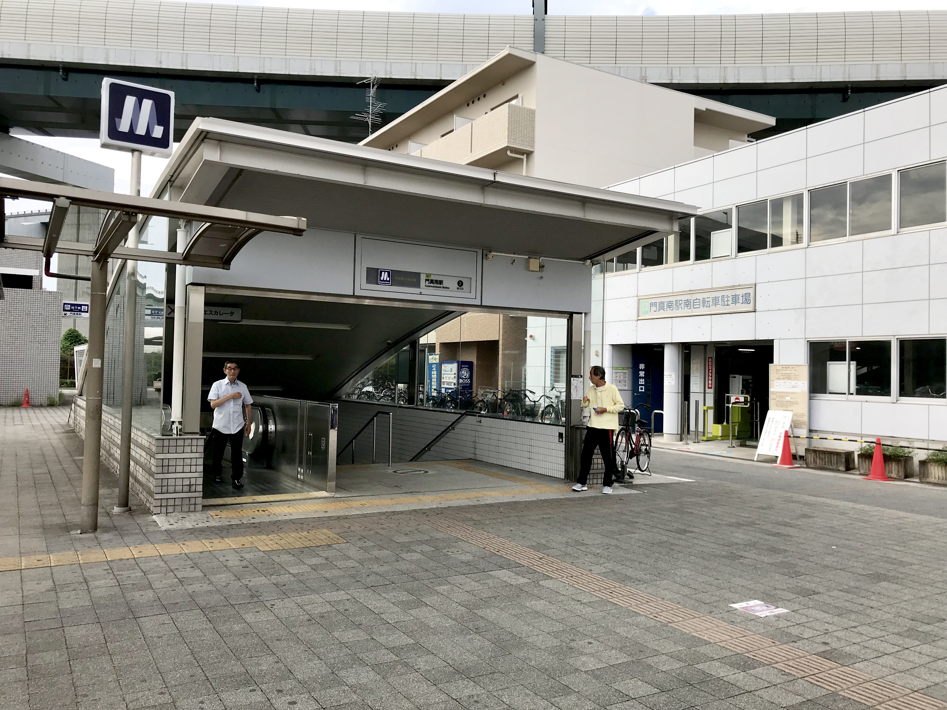 Osaka Metro門真南駅2号出入口